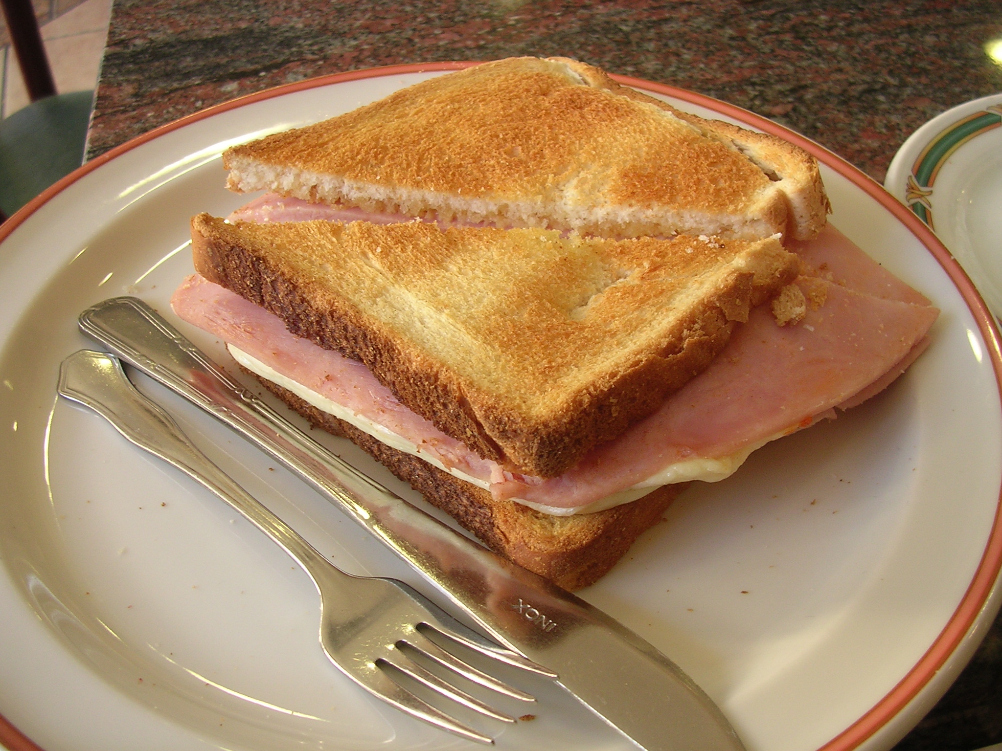 Sandwich Mixto